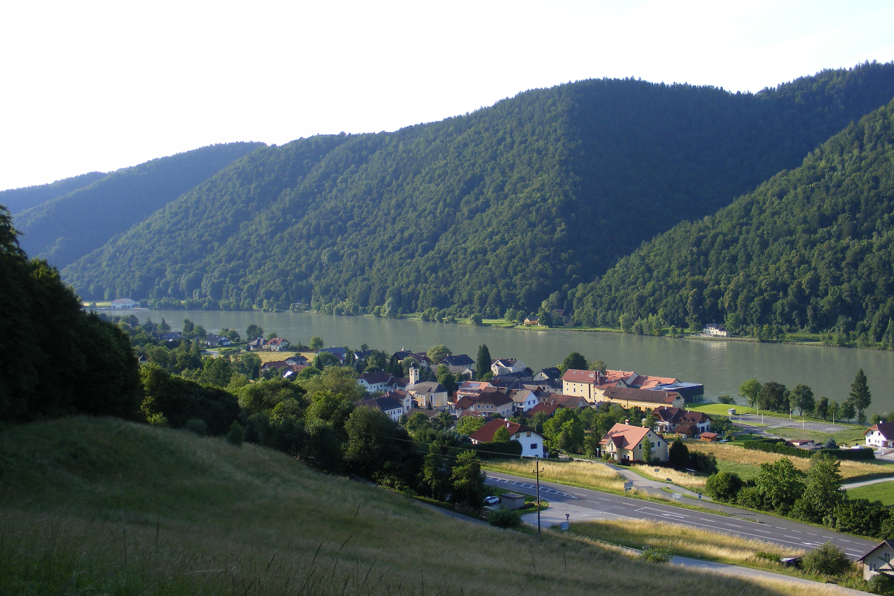 Wesenufer